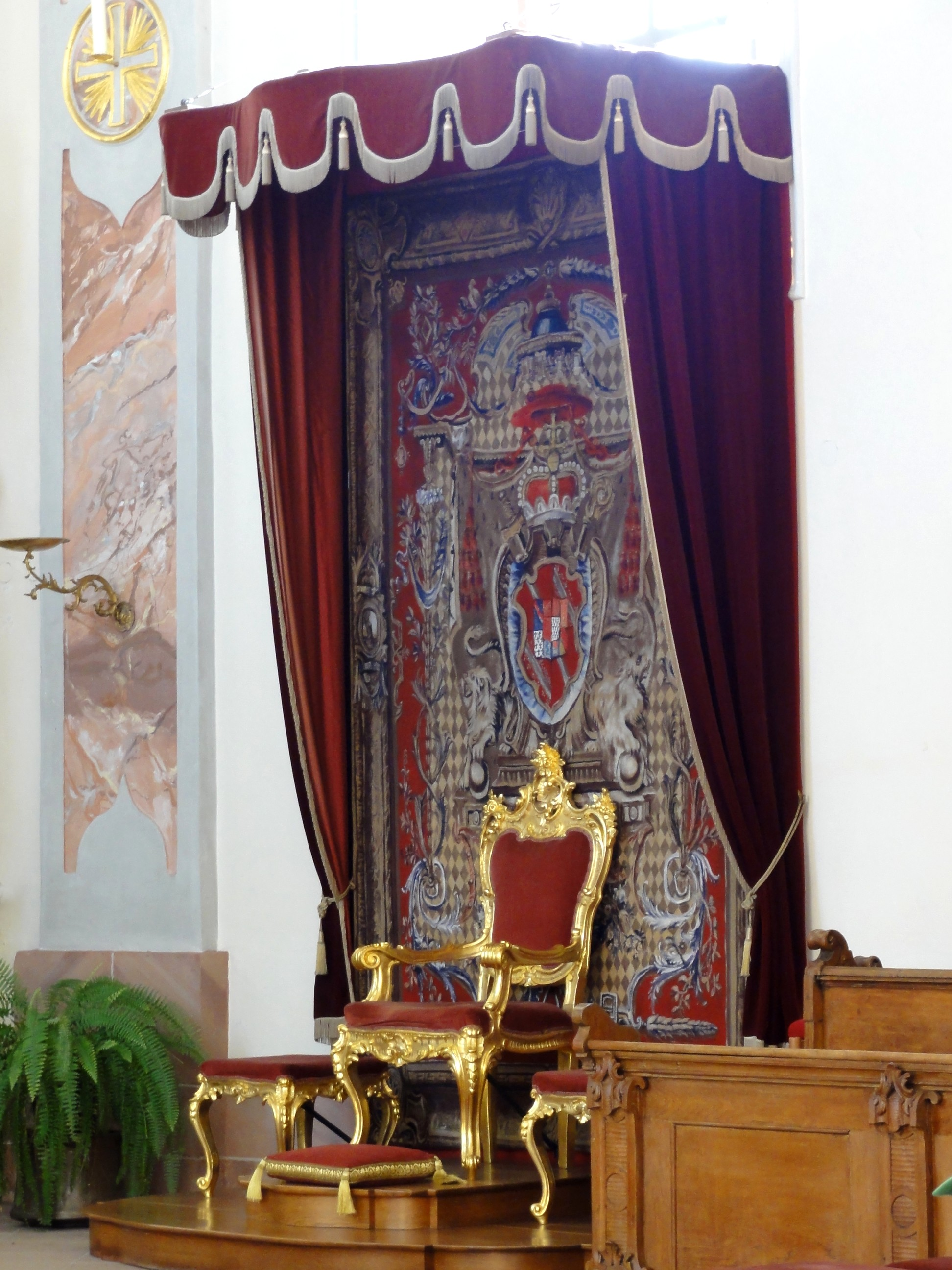 Baden-Württemberg, Ettenheim, St. Batholomäus Kirche